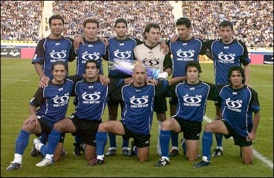 Saba Battery 1 - 1 Esteghlal